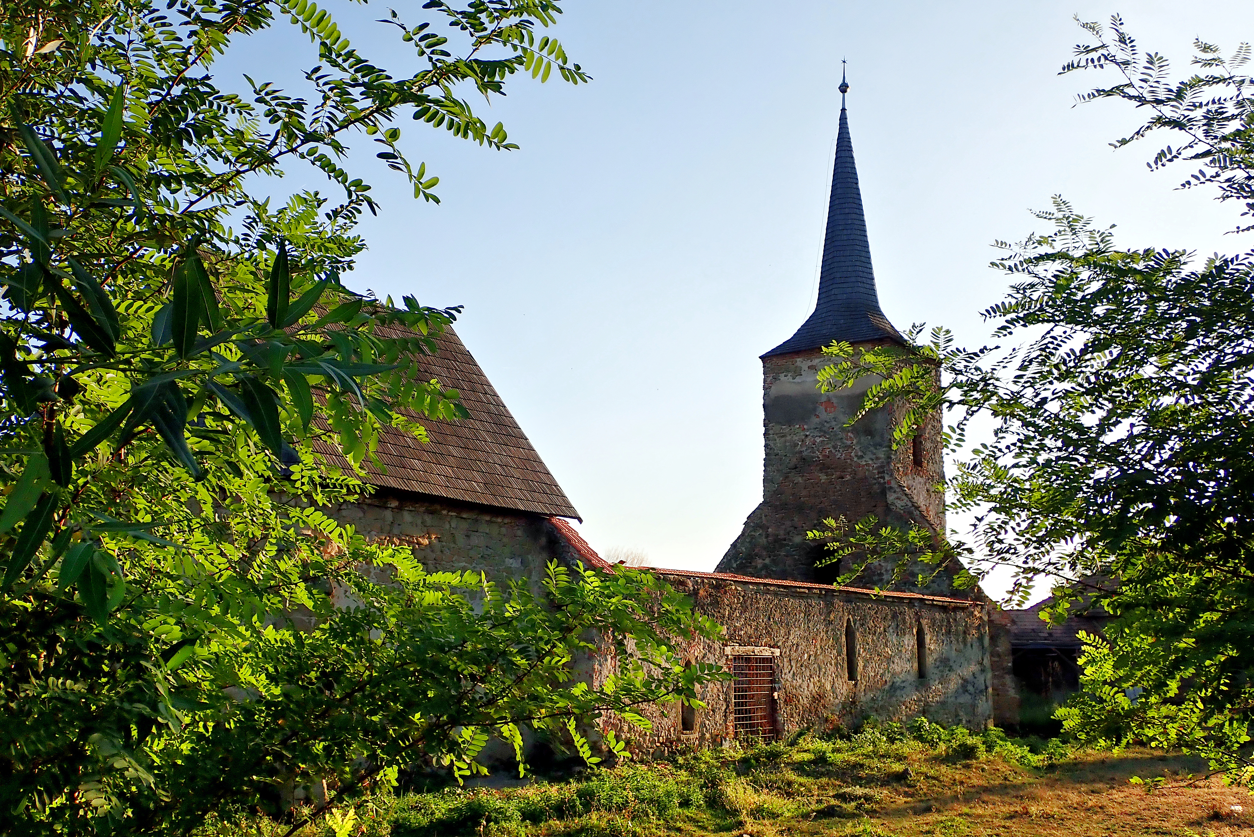 Ansamblul bisericii evanghelice 02